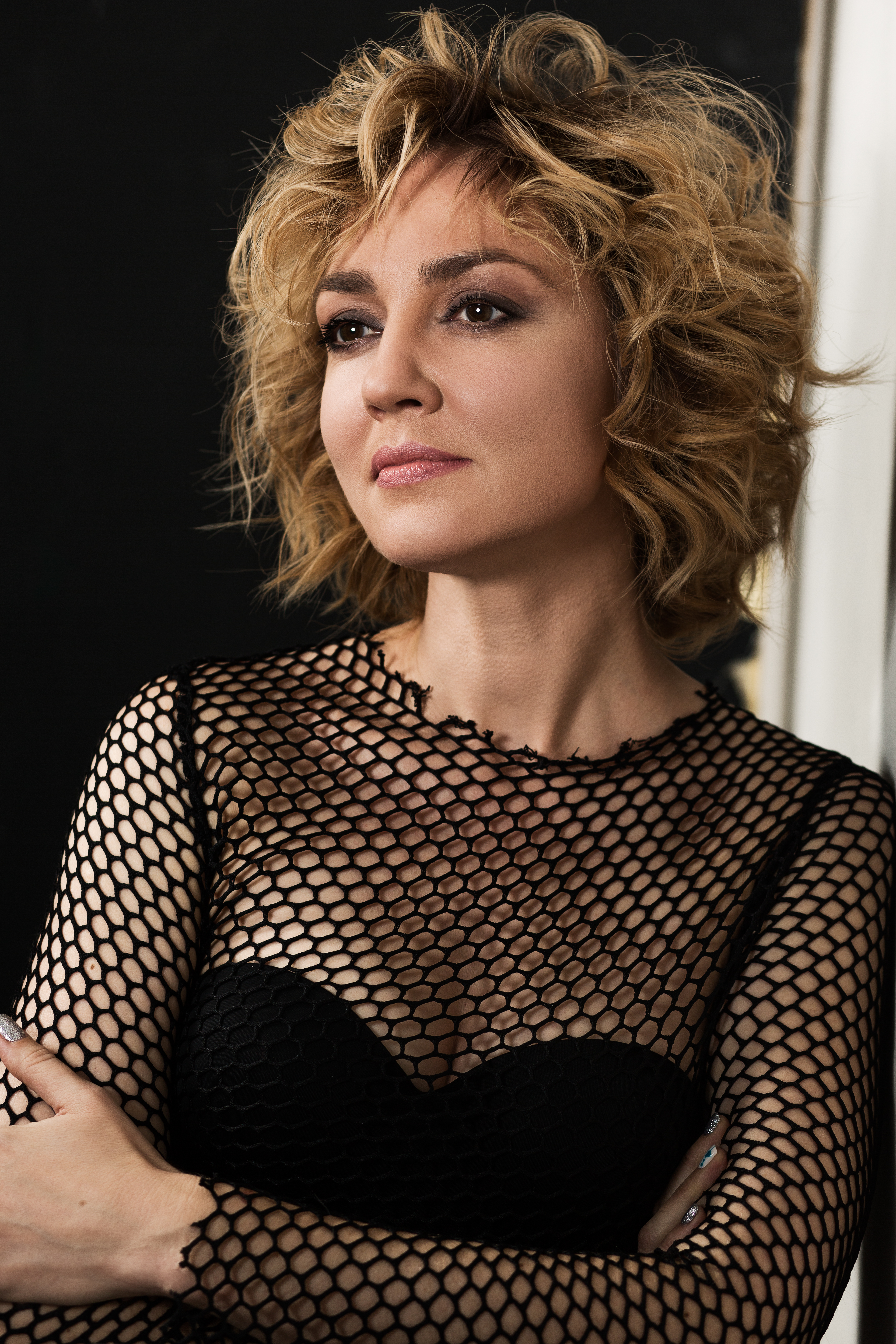 Российская джазовая певица - Анна Бутурлина.